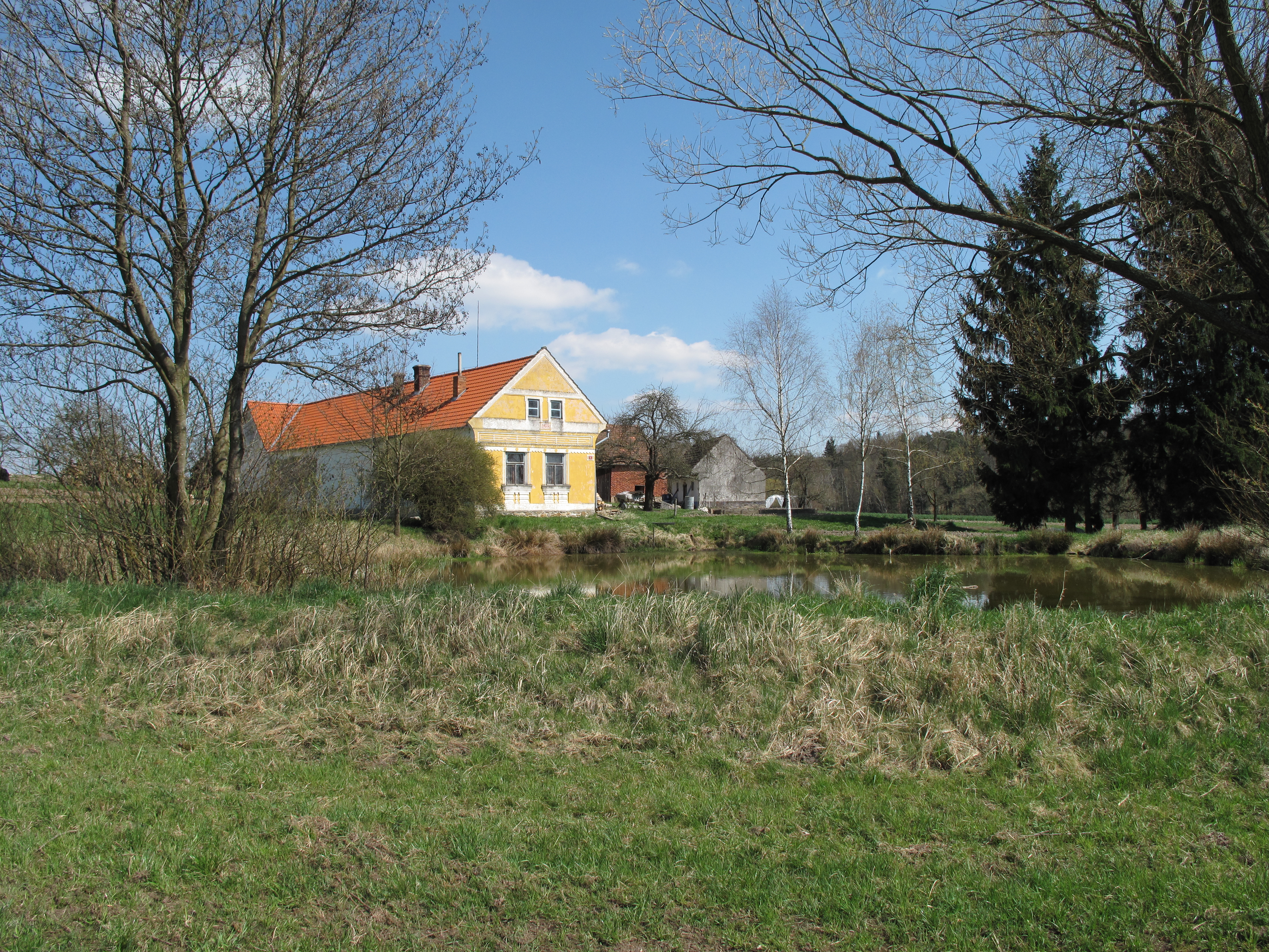 Rybník v Hrušově. Okres České Budějovice, Česká republika.